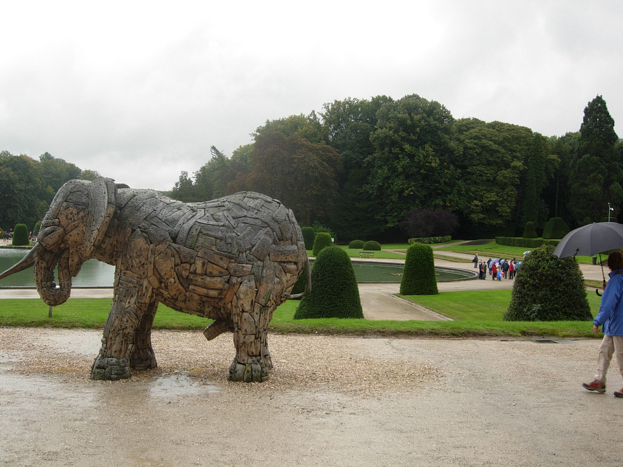 Beelden in het park